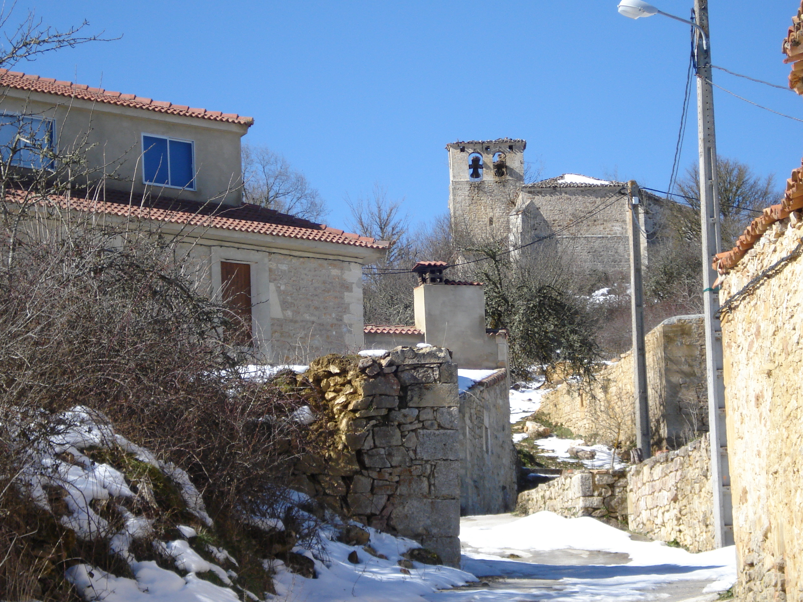 Iglesia de San Torcuato (S. XII) vista desde el pueblo. Febrero de 2012